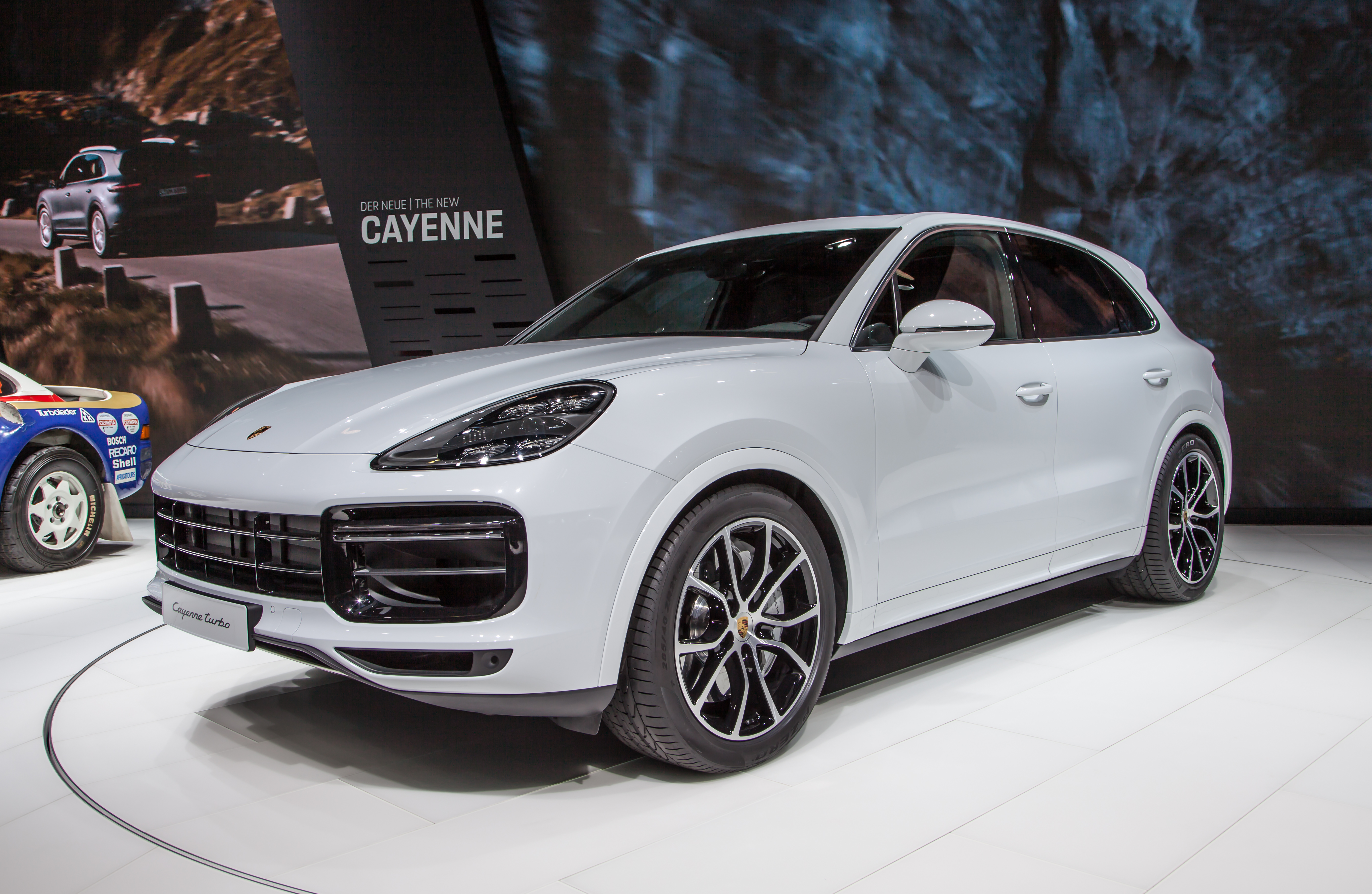 Porsche Cayenne Turbo